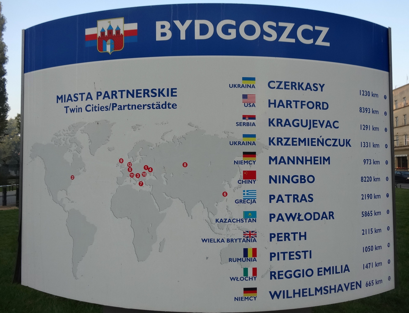 Tablica stojąca przy ul. Mostowej w Bydgoszczy, na której przedstawiono miasta partnerskie Bydgoszczy